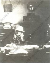 约翰.拉贝先生正在南京国际安全区的办公室工作的照片。在这里，拉贝先生写了拉贝日记